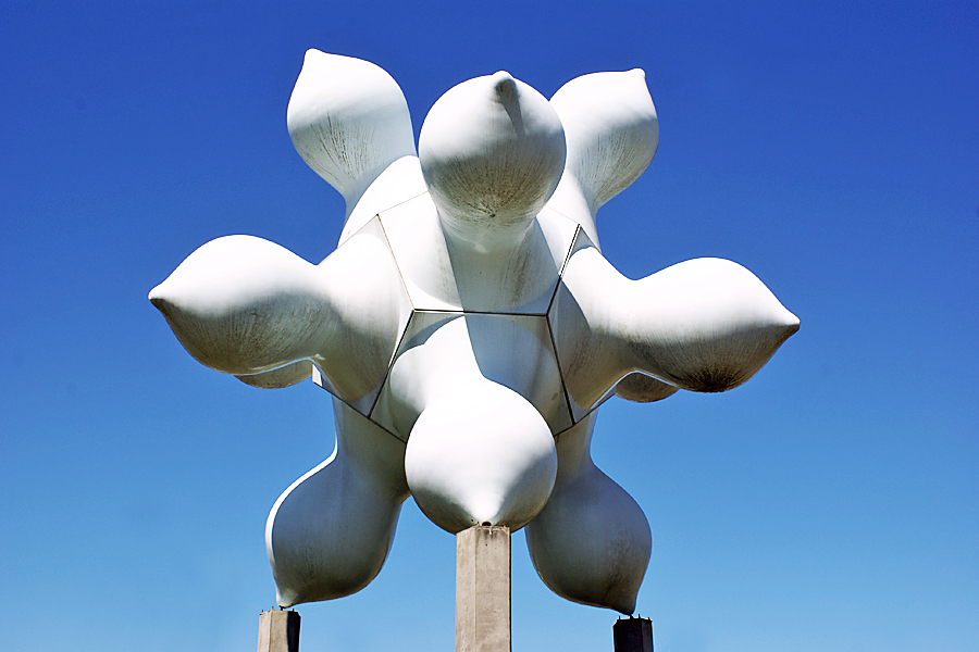 Obra da 4a. Bienal de Artes Visuais do Mercosul de 2003, doada ao município pelo artista Saint Clair Cemin in Porto Alegre/Brazil Porto Alegre, 2011